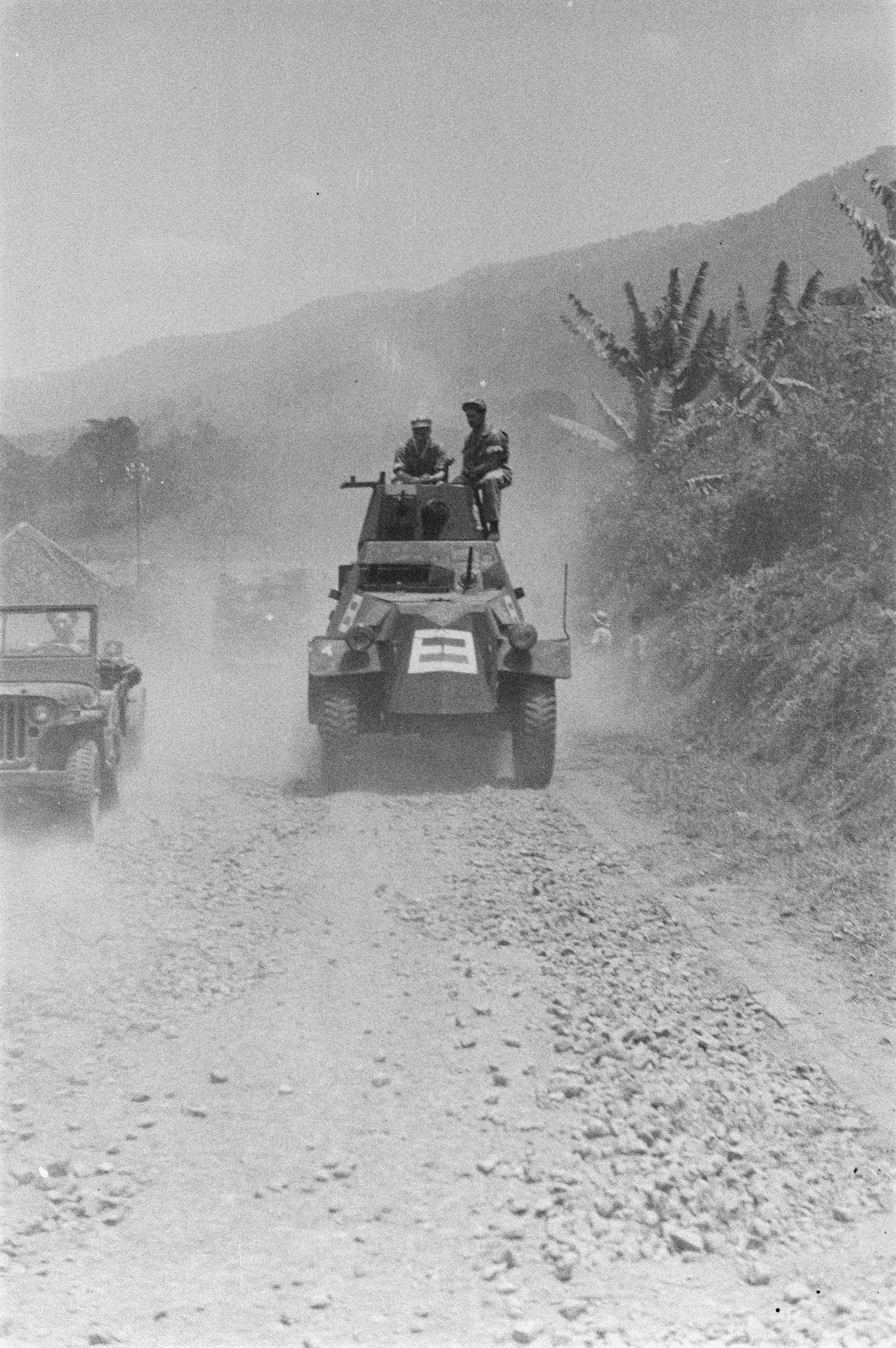 Collectie / Archief : Fotocollectie Dienst voor Legercontacten Indonesië Reportage / Serie : [DLC] Inspectiereis generaal P.L.G. Doorman (september-oktober 1946) Beschrijving : Pantserwagen KNIL [Marmon Herington Armoured Car] Annotatie : Juiste naam is: South African Reconnaissance Car Datum : september 1946 Locatie : Indonesië, Nederlands-Indië Fotograaf : Fotograaf Onbekend / DLC Auteursrechthebbende : Nationaal Archief Materiaalsoort : Negatief (zwart/wit) Nummer archiefinventaris : bekijk toegang 2.24.04.03 Bestanddeelnummer : 56-5-5